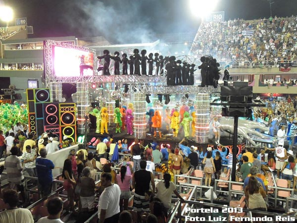 Portela - Carnaval 2013 - Desfile Oficial - 7ª Colocada no Grupo Especial - Seleção 01 Fotografias: Luiz Fernando Reis Enredo: Madureira... onde o meu coração se deixou levar. Carnavalesco: Paulo Menezes